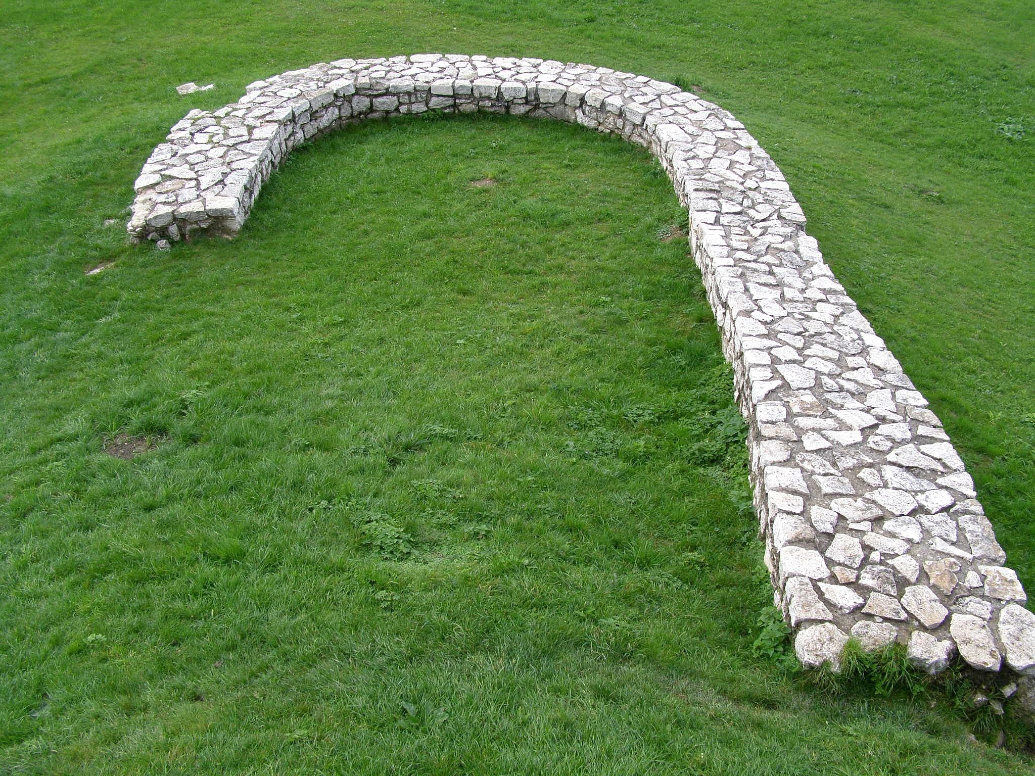 Základy barbakanu z druhej polovice 14. stor. pred vstupnou bránou do stredného hradu